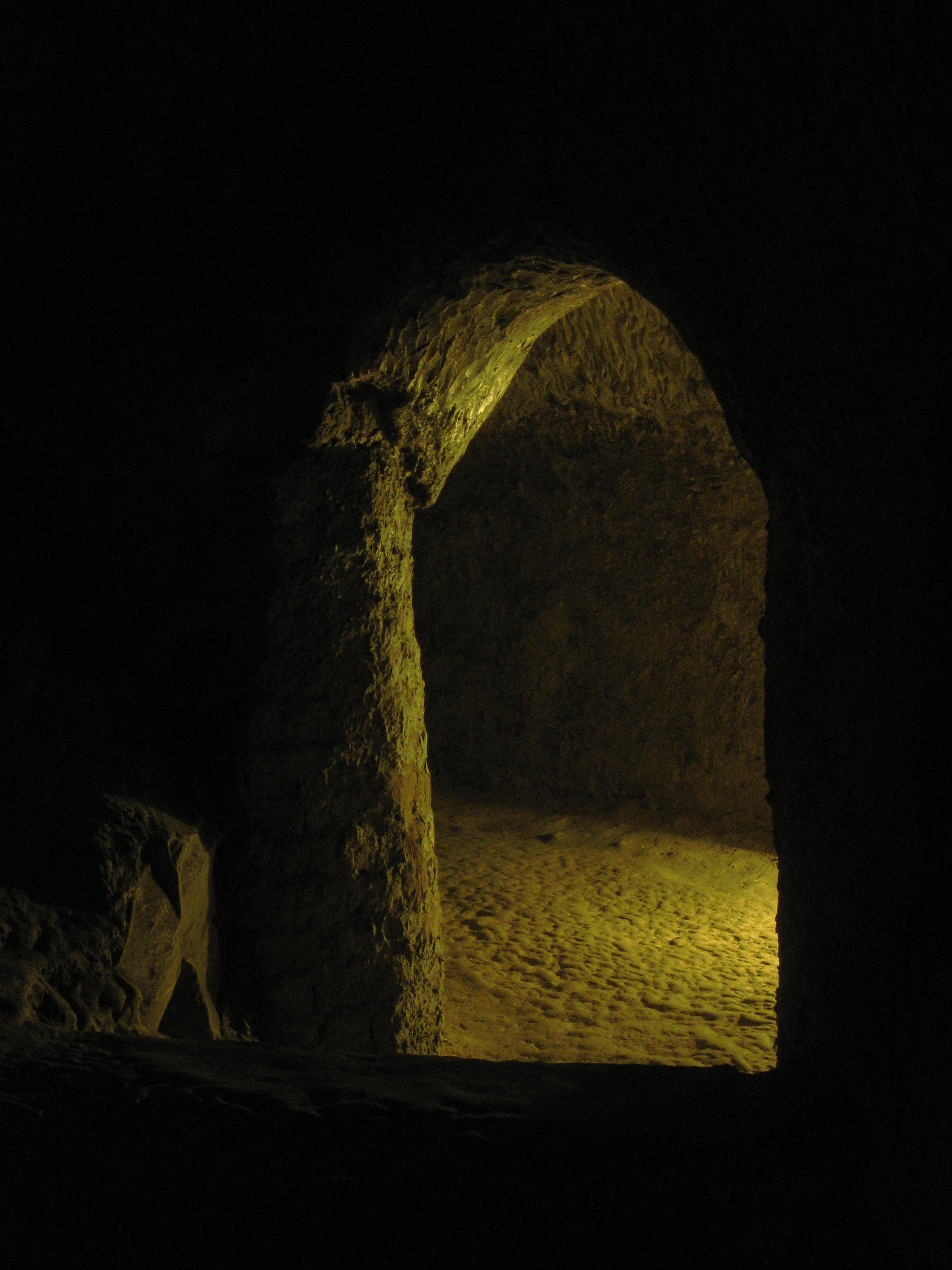 Chełm - podziemia kredowe